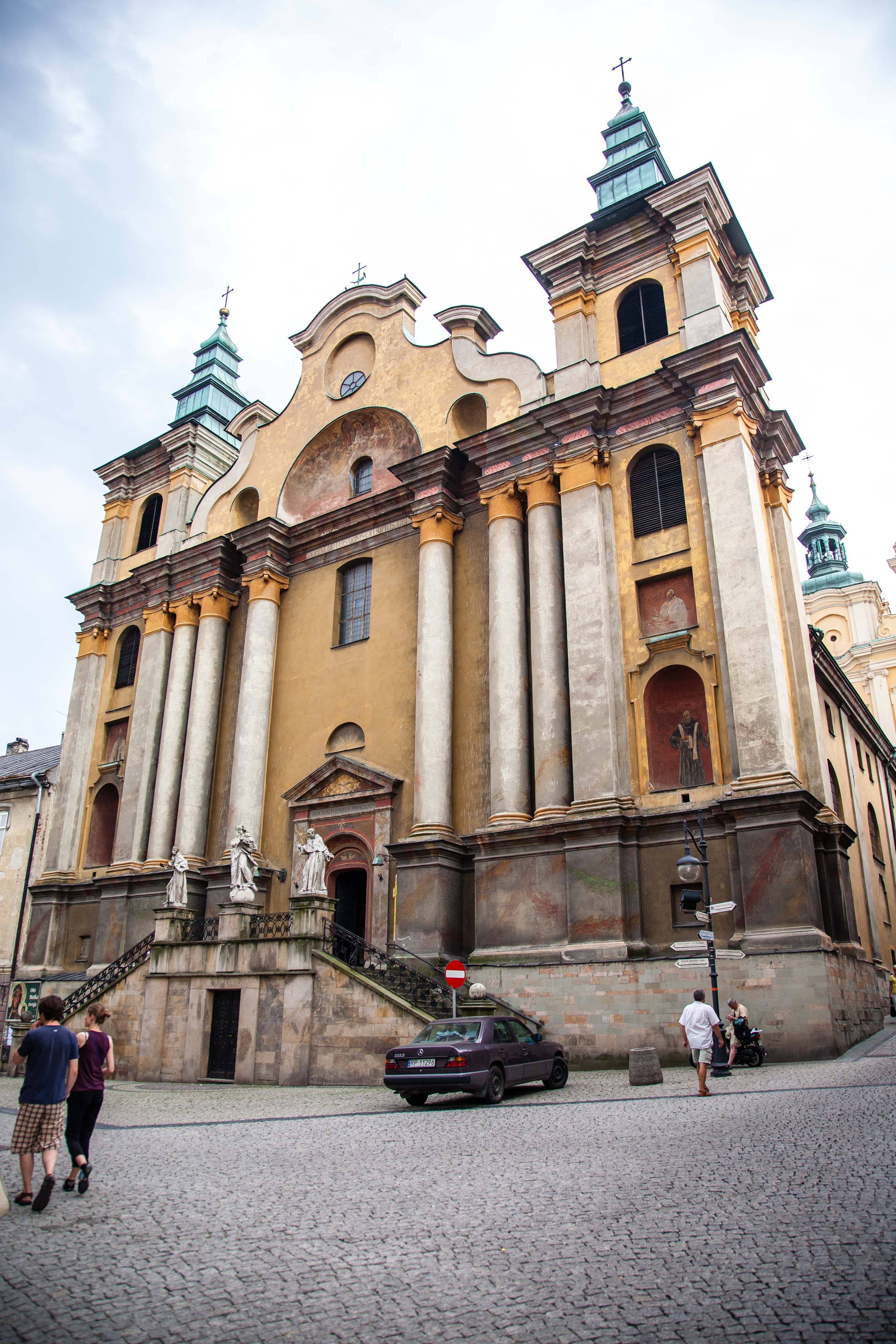 Przemyśl, ul. Franciszkańska - Kościół św. Marii Magdaleny i Matki Bożej Niepokalanej w zespole klasztornym franciszkanów (zabytek nr A-428 z 06.06.1983)